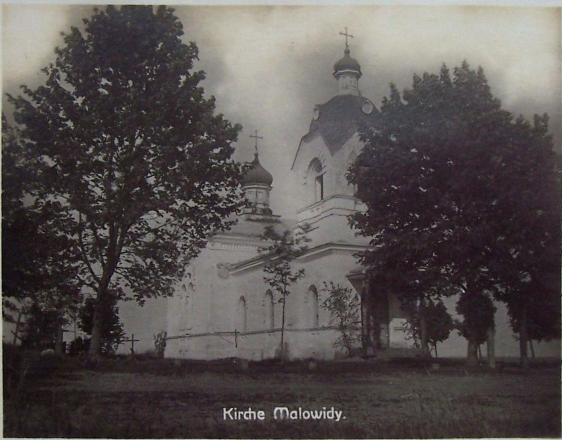 Беларуская (тарашкевіца): Мілавіды (Miłavidy), царква. Нямецкая паштоўка часоў Першай сусьветнай вайны